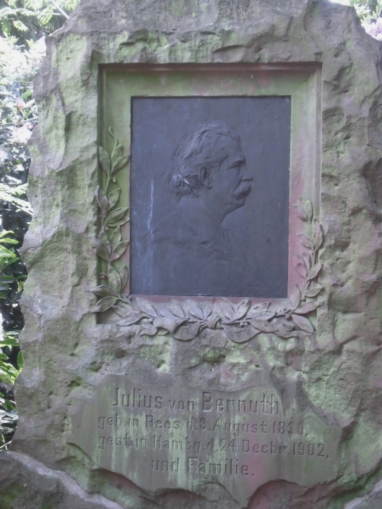 Grab des Komponisten und Dirigenten Julius von Bernuth (1830-1902) auf dem Friedhof Ohlsdorf in Hamburg. Details: Barbara Leisner, Heiko K. L. Schulze, Ellen Thormann: Der Hamburger Hauptfriedhof Ohlsdorf. Geschichte und Grabmäler, Verlag Hans Christians, Hamburg 1990, Seite 30, Kat. 126.